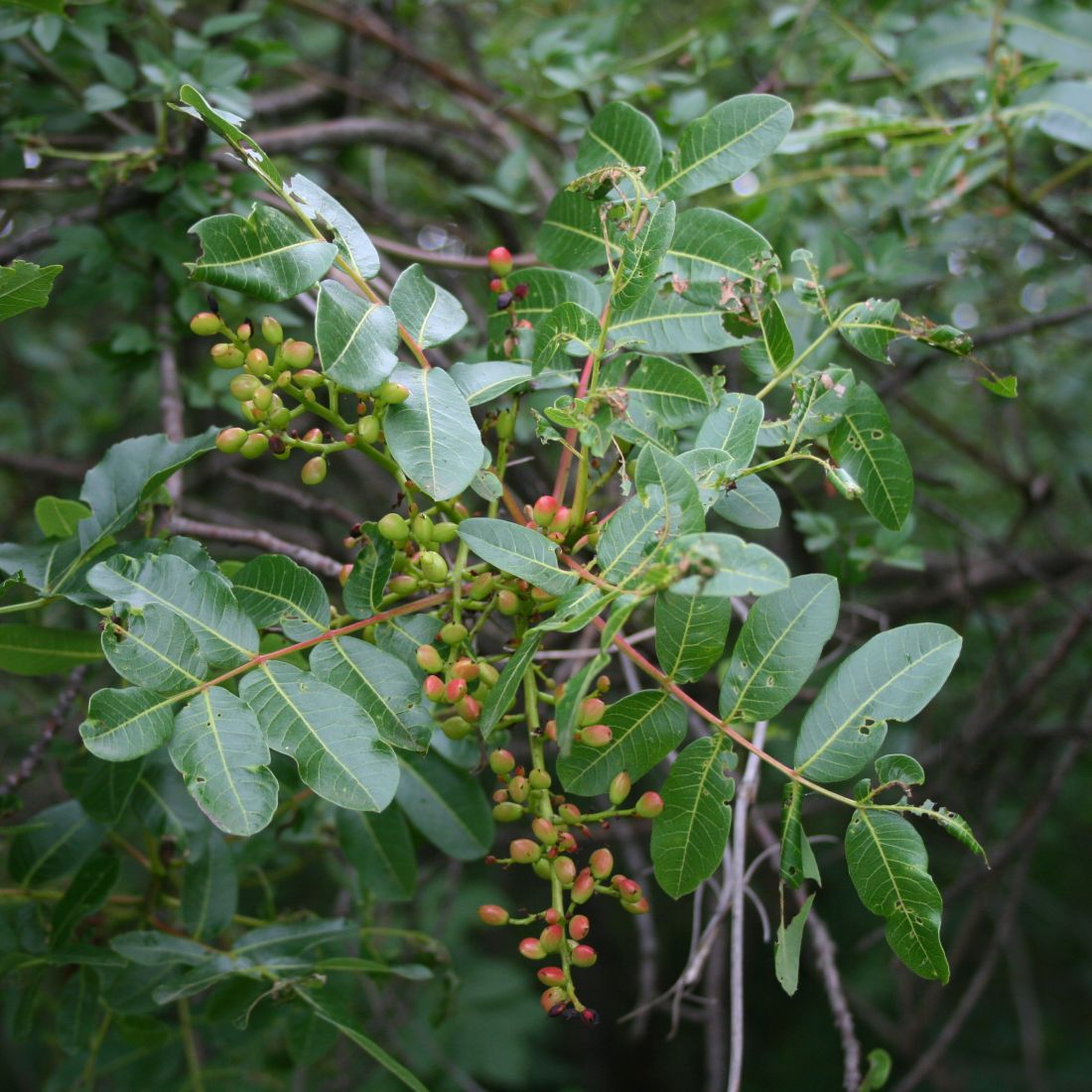 Pistacia terebinthus, Sumachgewächse (Anacardiaceae) - Italien/Italia/Italy: Friuli-Venezia Giulia, Prov. Trieste, Rilkeweg/Sentiero Rilke von Sistiana nach Duino